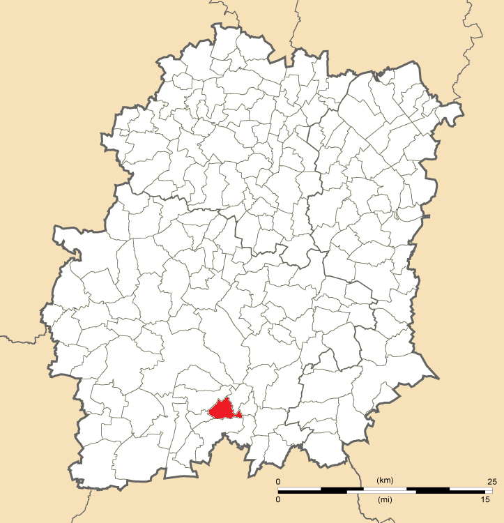 Carte de position de Marolles-en-Beauce en Essonne (91)